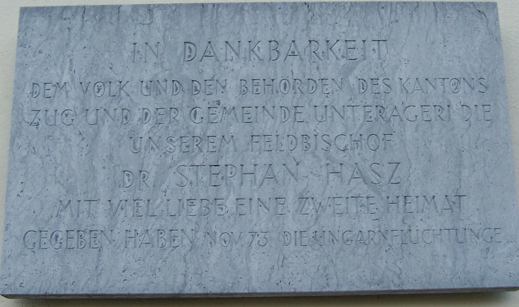 Ungarnflüchtlinge danken für die 1956-er Aufnahme vom Feldbischof Dr. Stephan Hasz in Unterägeri, Kanton Zug, Schweiz. Gedenktafel an der katholischen Pfarrkirche von Unterägeri, eingeweiht im November 1973.